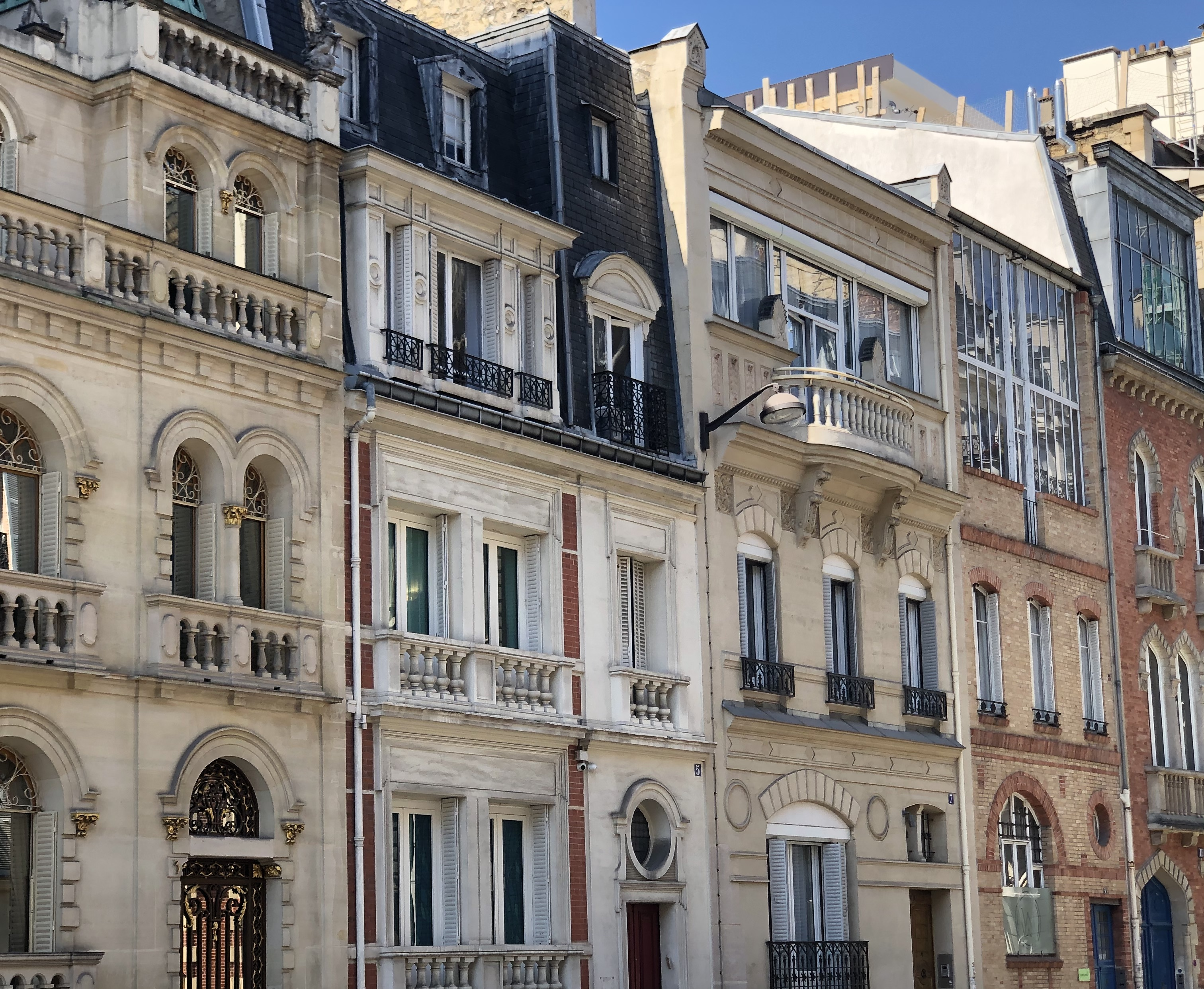 Façades d'hôtels particuliers XIXème siècle, Rue Alphonse-de-Neuville, Paris 17